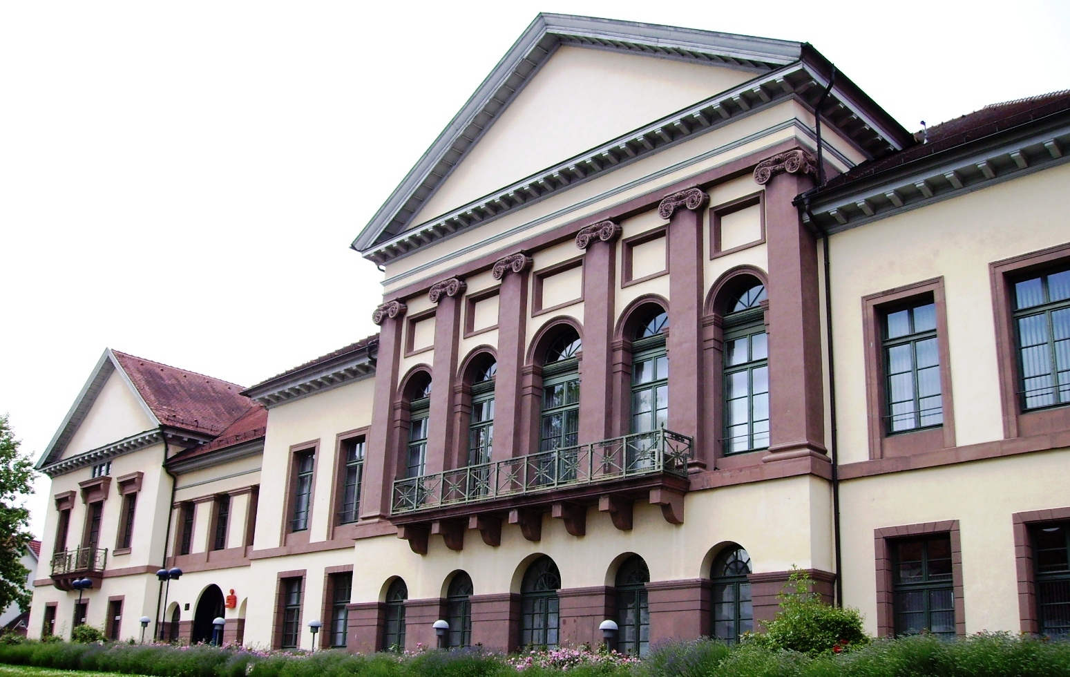 Hechingen, Germany